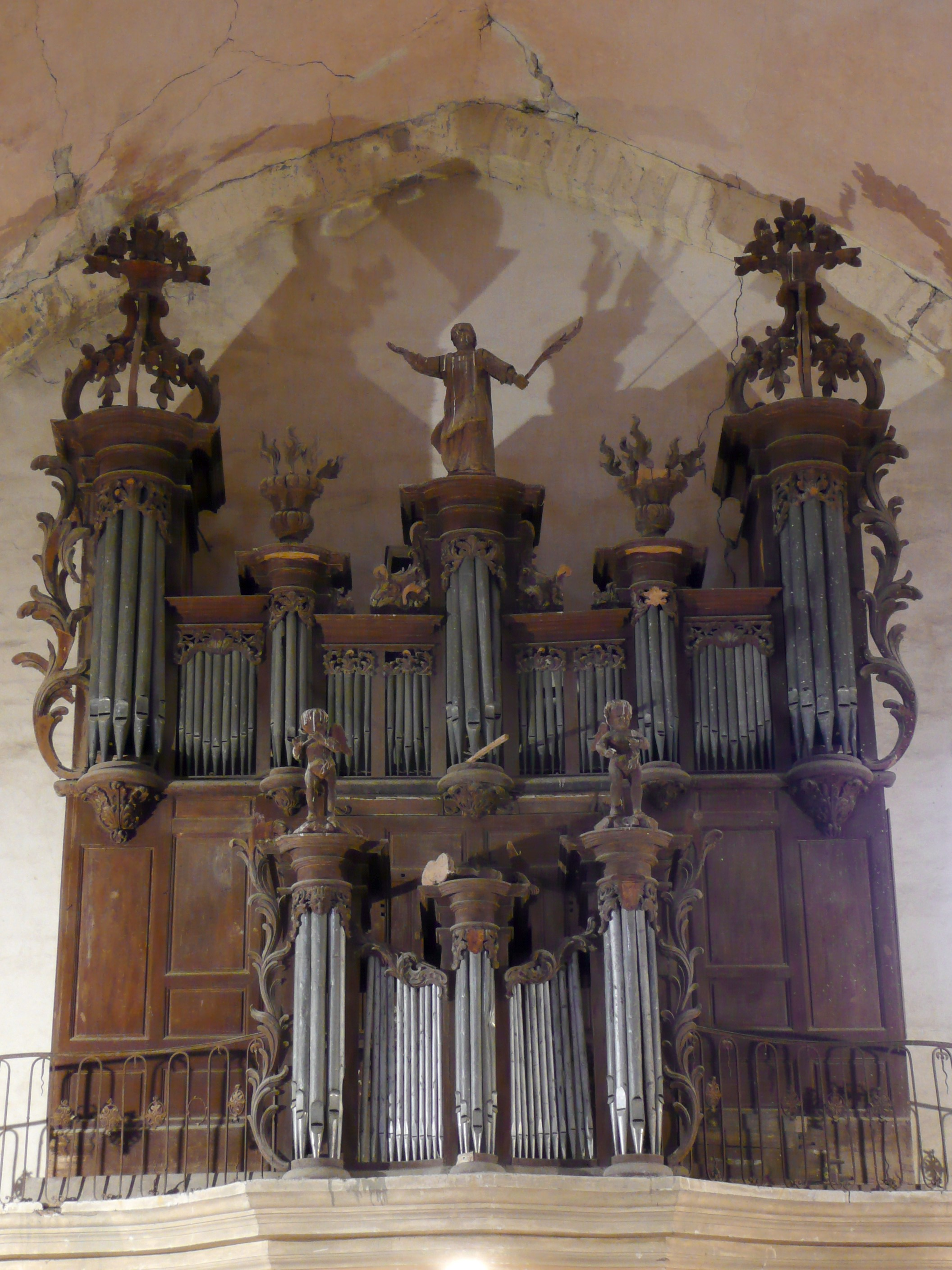 Saint-Papoul en Lauragais (Aude, France), dans l'ancienne cathédrale St Papoul, orgue de Jean-François L’Épine reconstruit à partir d'éléments du 17e siècle et de 1750, en 1760, aujourd'hui délabré alors qu'il pourrait bien être le seul témoignage d'une harmonisation de Lépine.